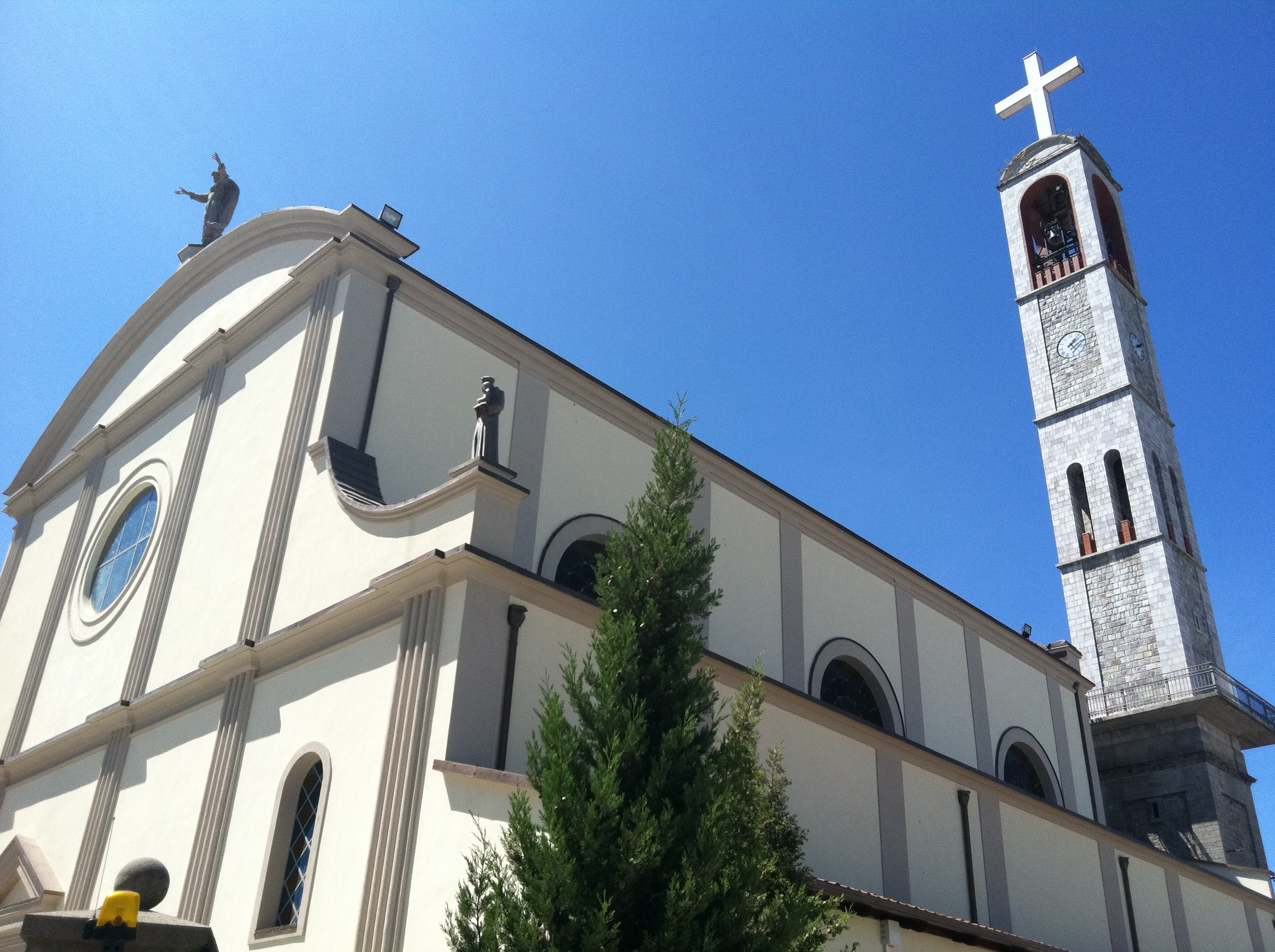 Kisha Franceskane